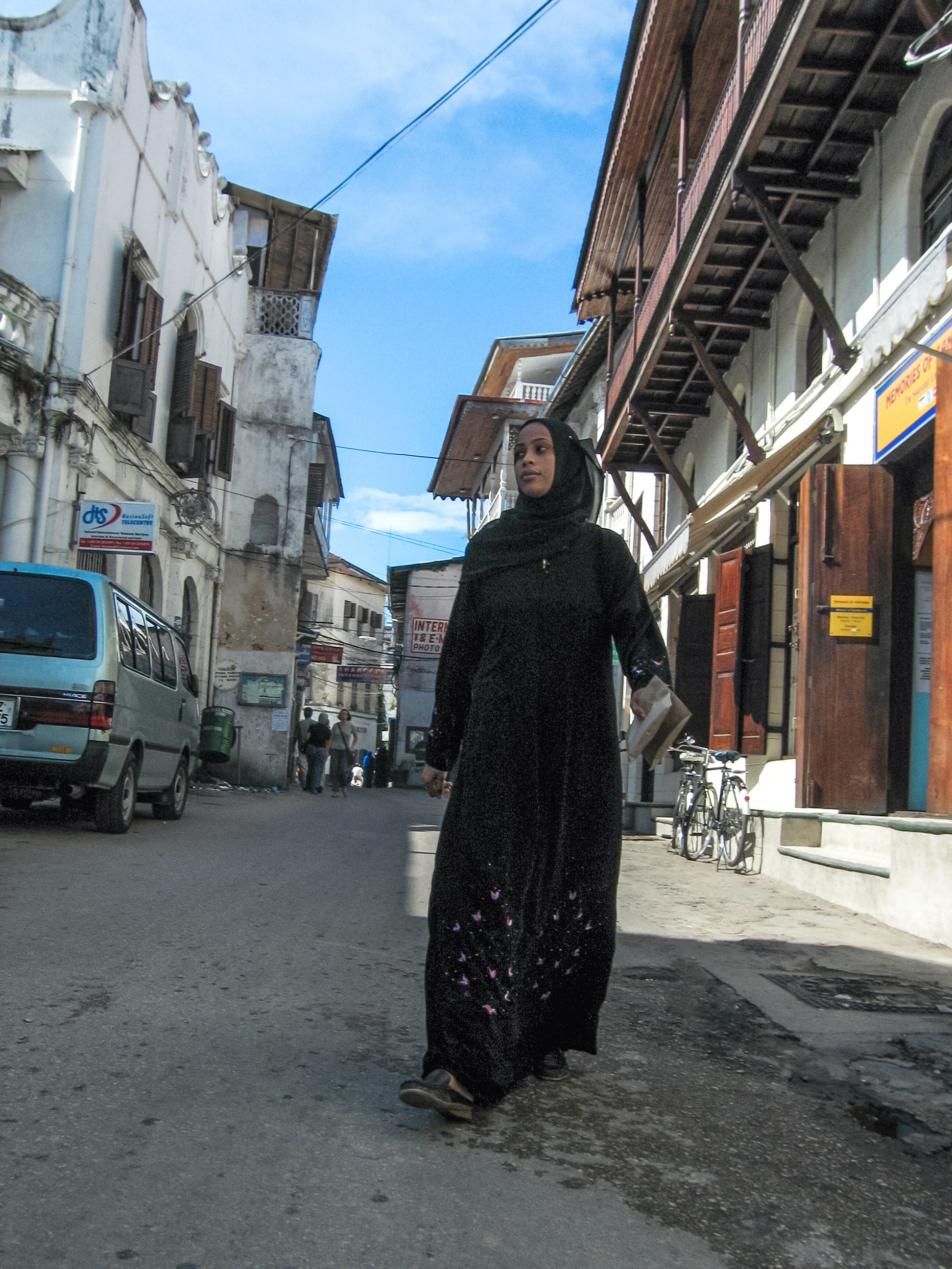 Lady wearing jilbab in Zanzibar Lady wearking jilbāb Zanzibar